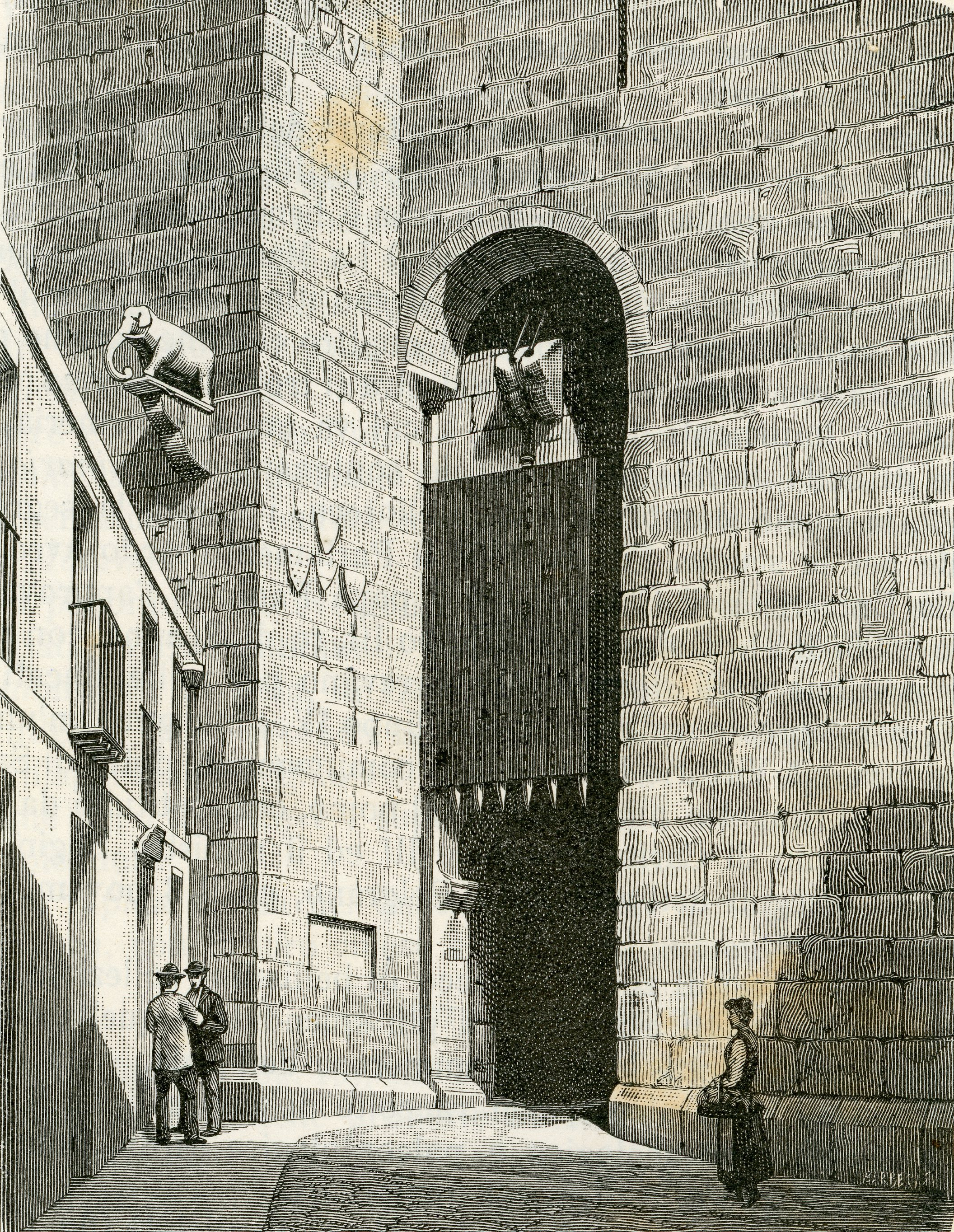 Cagliari: Torre dell’elefante con saracinesca, (xilografia di Barberis 1895).